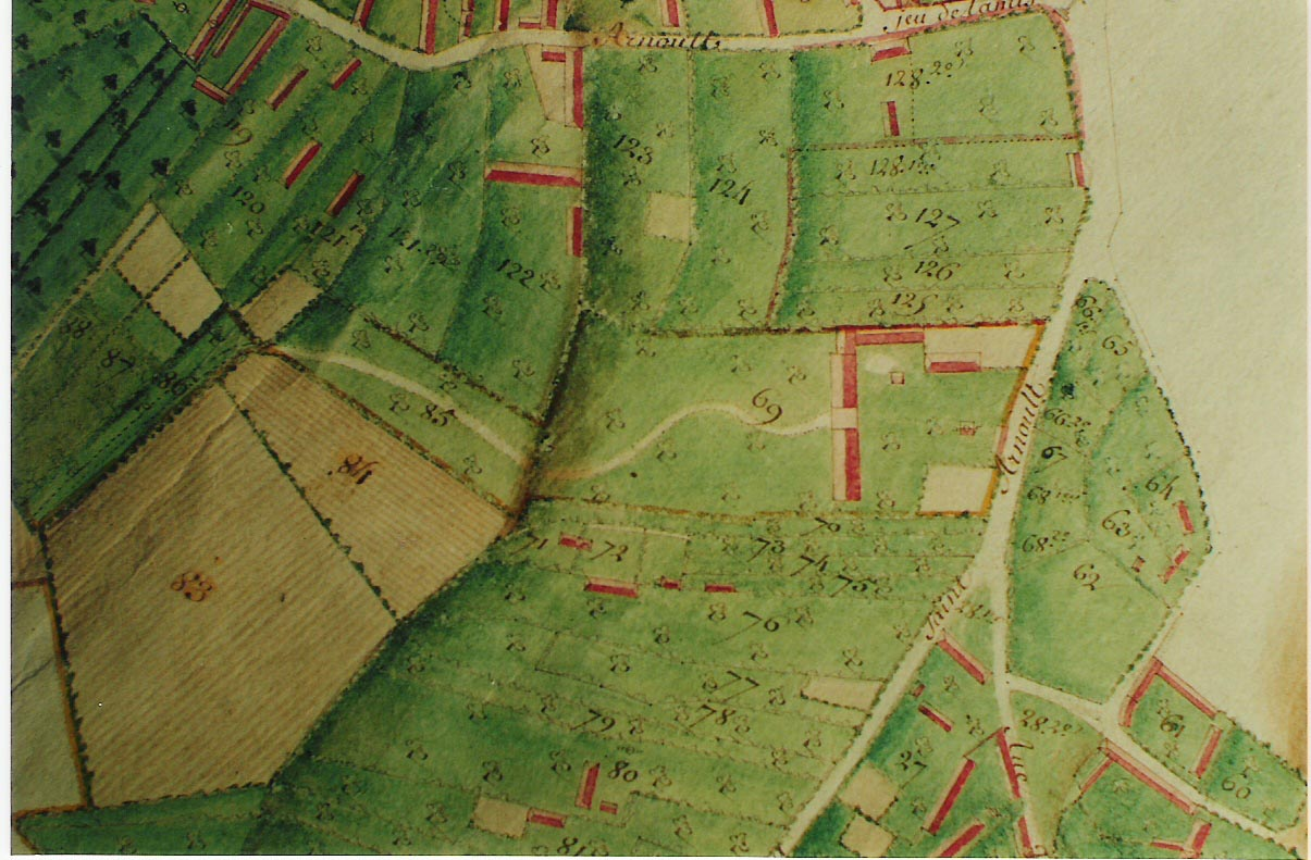 Plan des bâtiments du Prieuré de Saint-Arnoult sur un plan de 1751(détail)à la demande de l'Abbé de Beaubec.